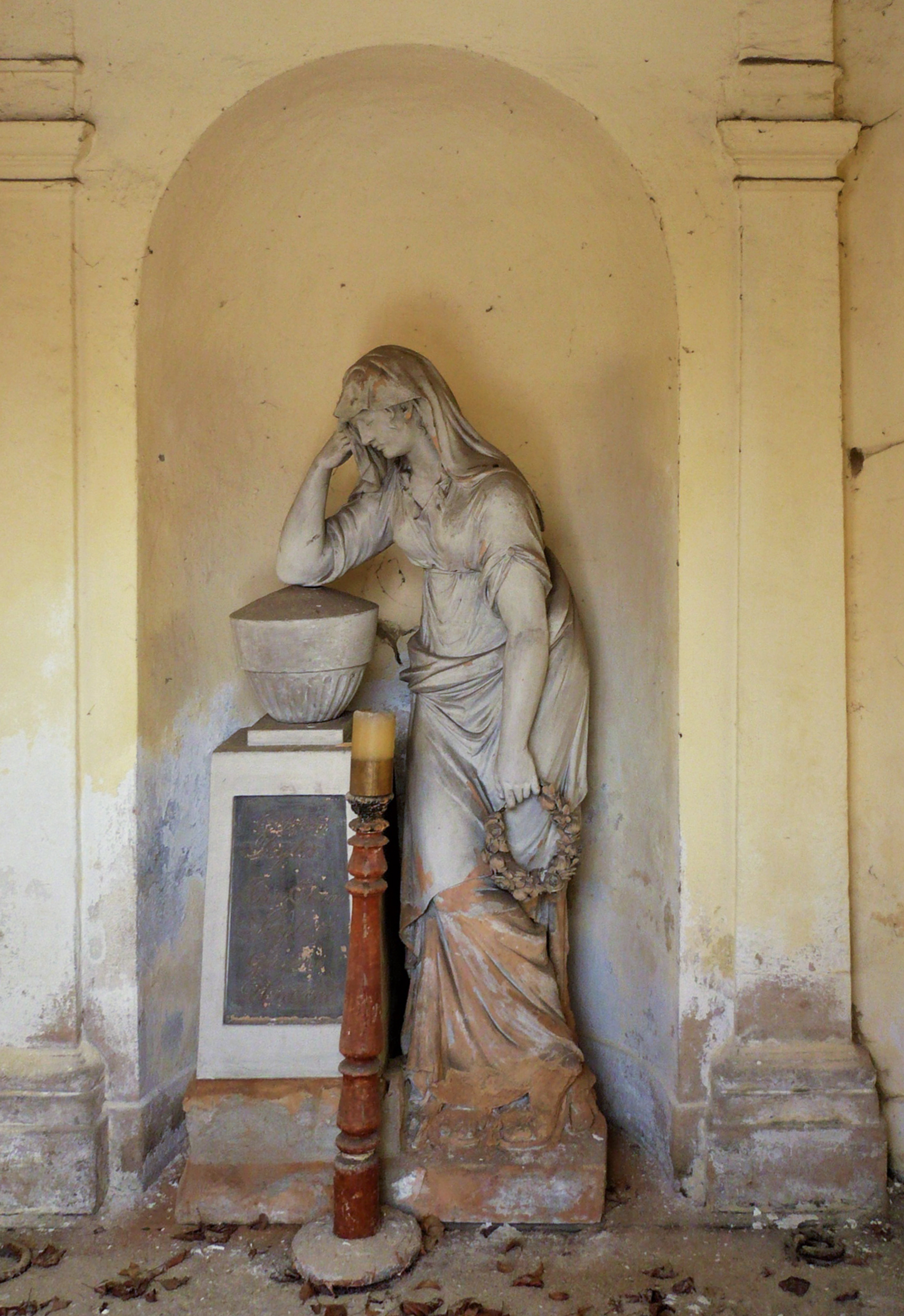 Walim, kaplica grobowa Seylerów, ul. Wyszyńskiego, z około 1800 r.